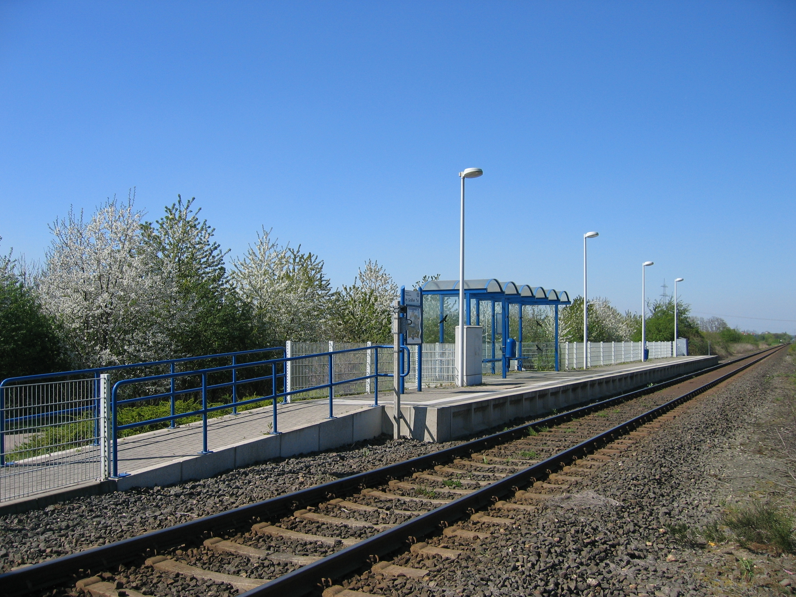 Bahnhof Düren Im Großen Tal an der Bahnstrecke Jülich–Düren